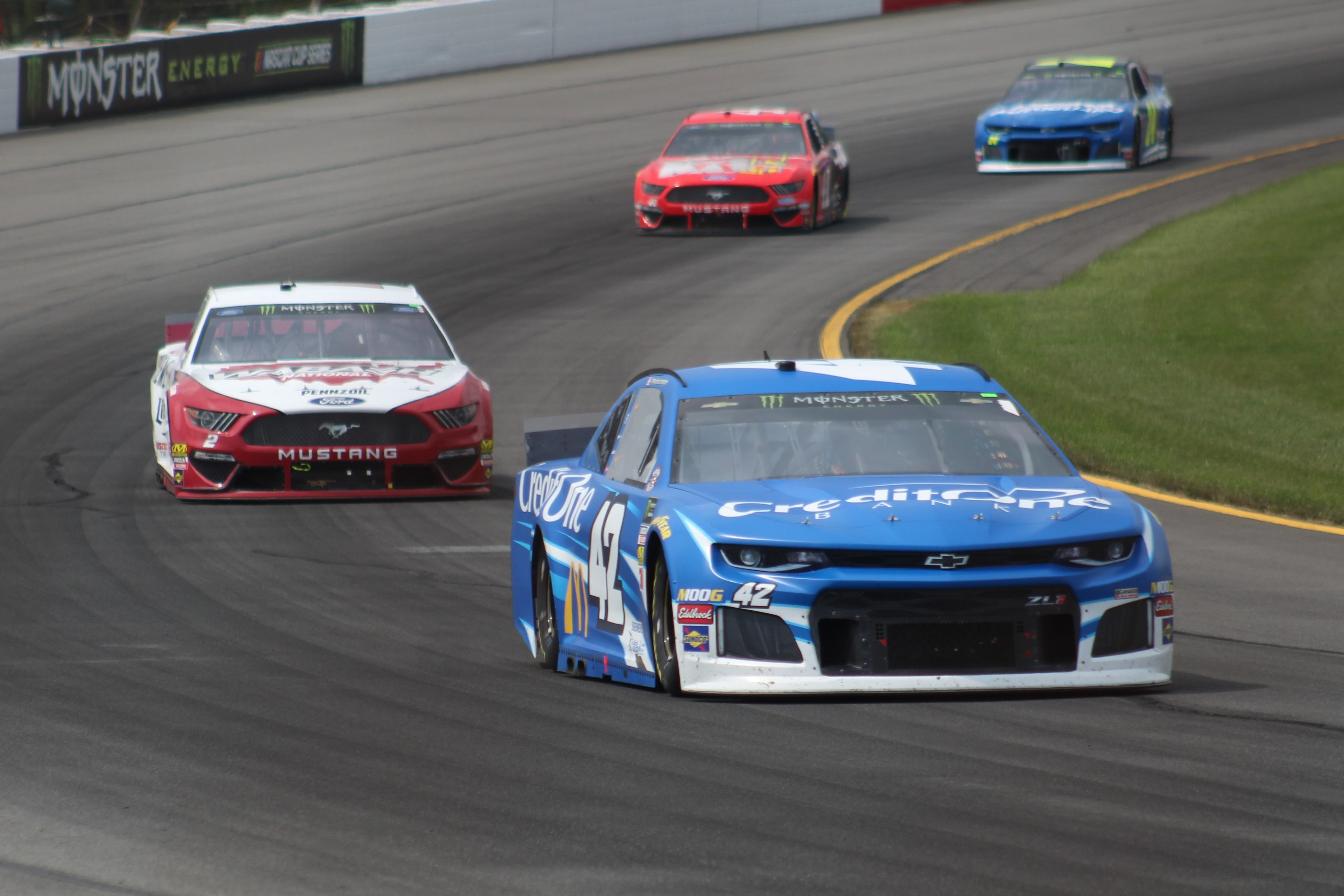 2019 Pocono 400